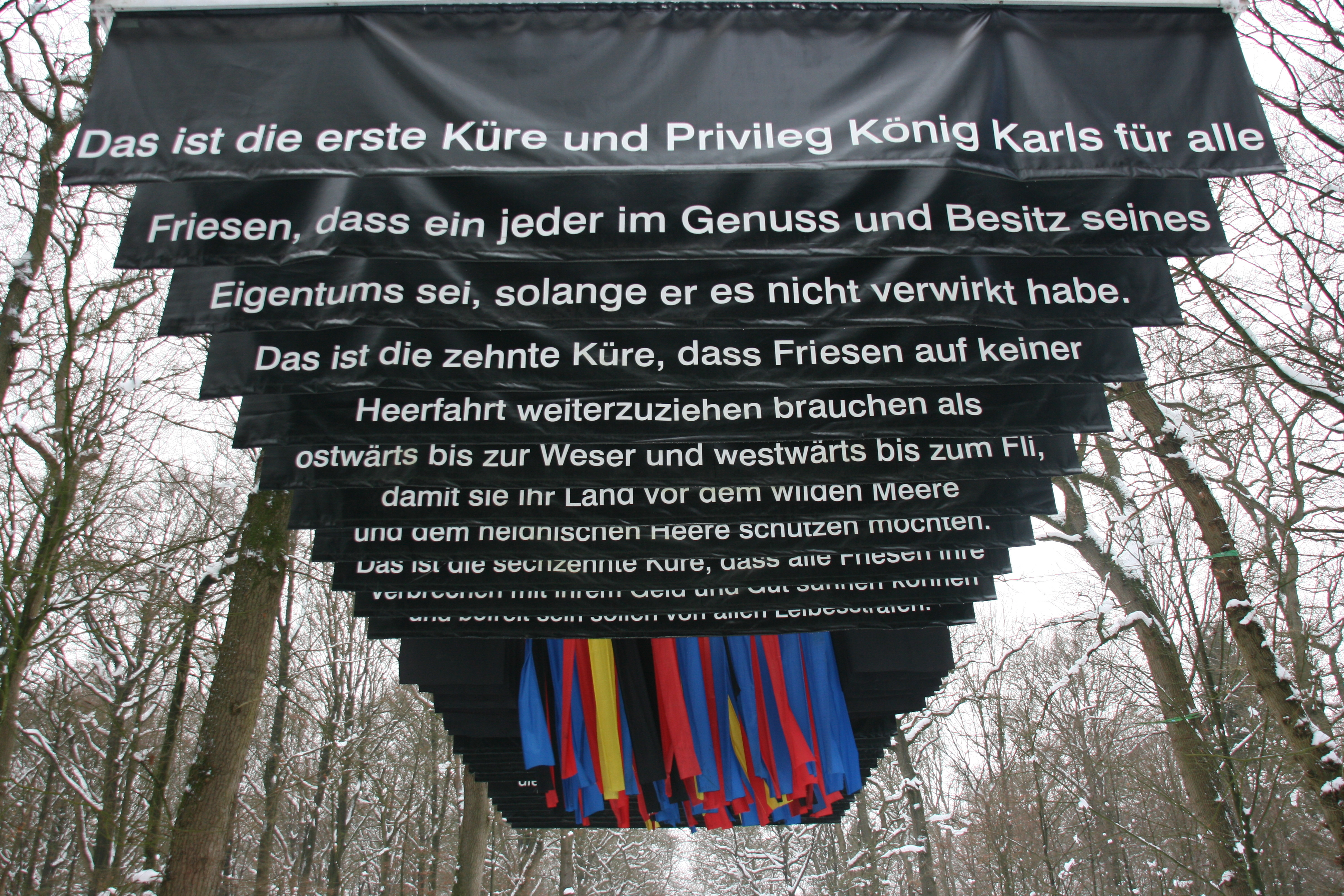 Kloster Ihlow Installation Friesische Freiheit